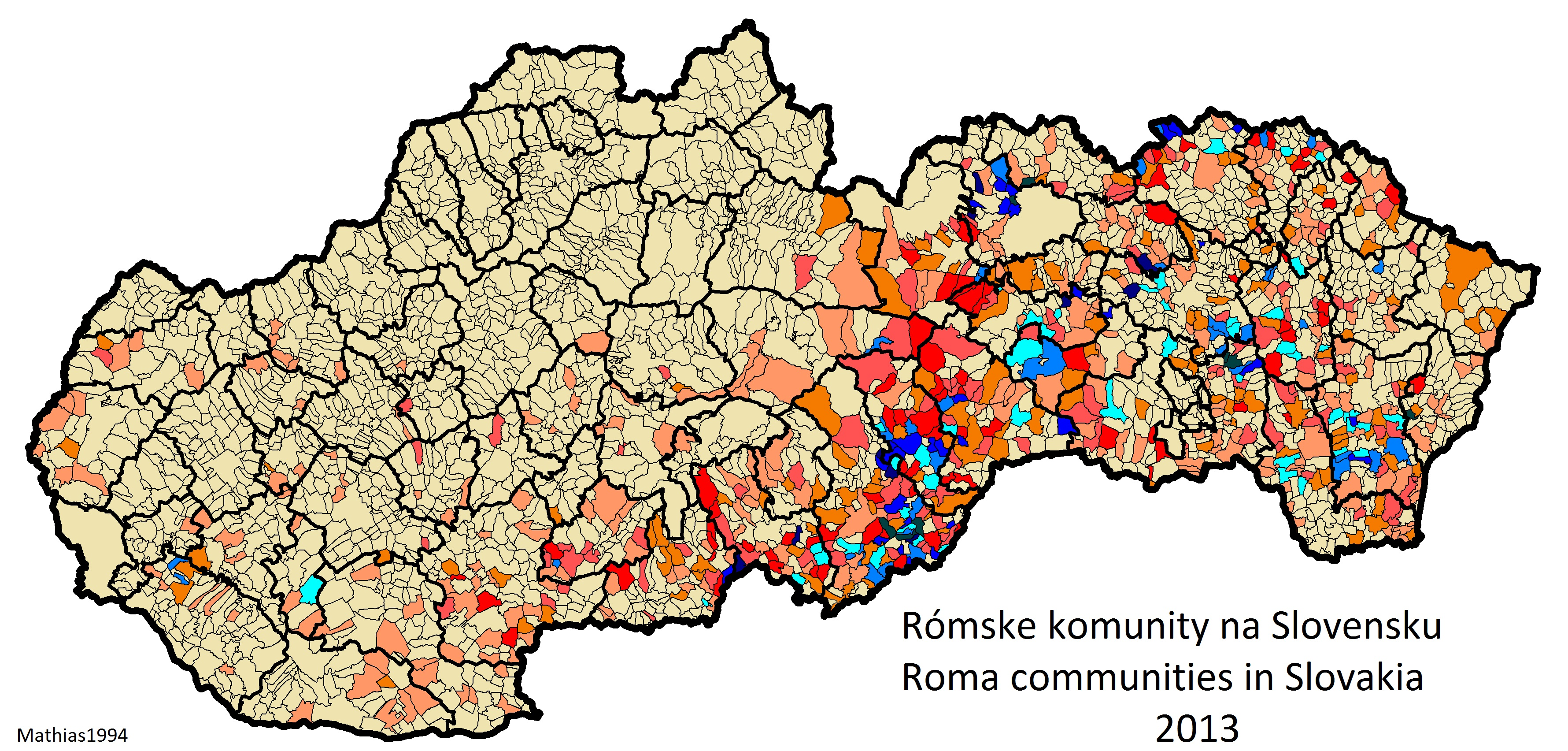 Rómske obyvateľstvo na Slovenku v roku 2013.